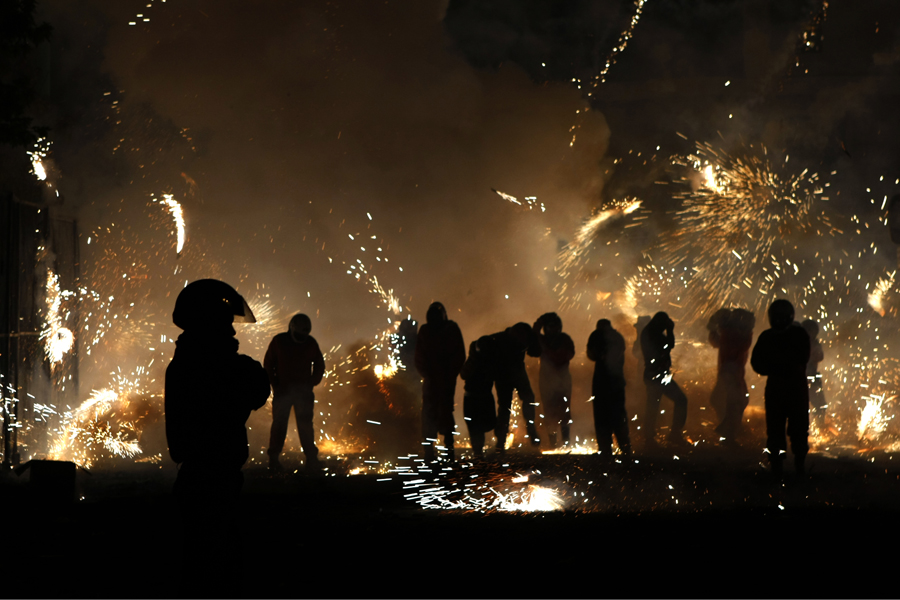 Corda, cohetes, Eliana